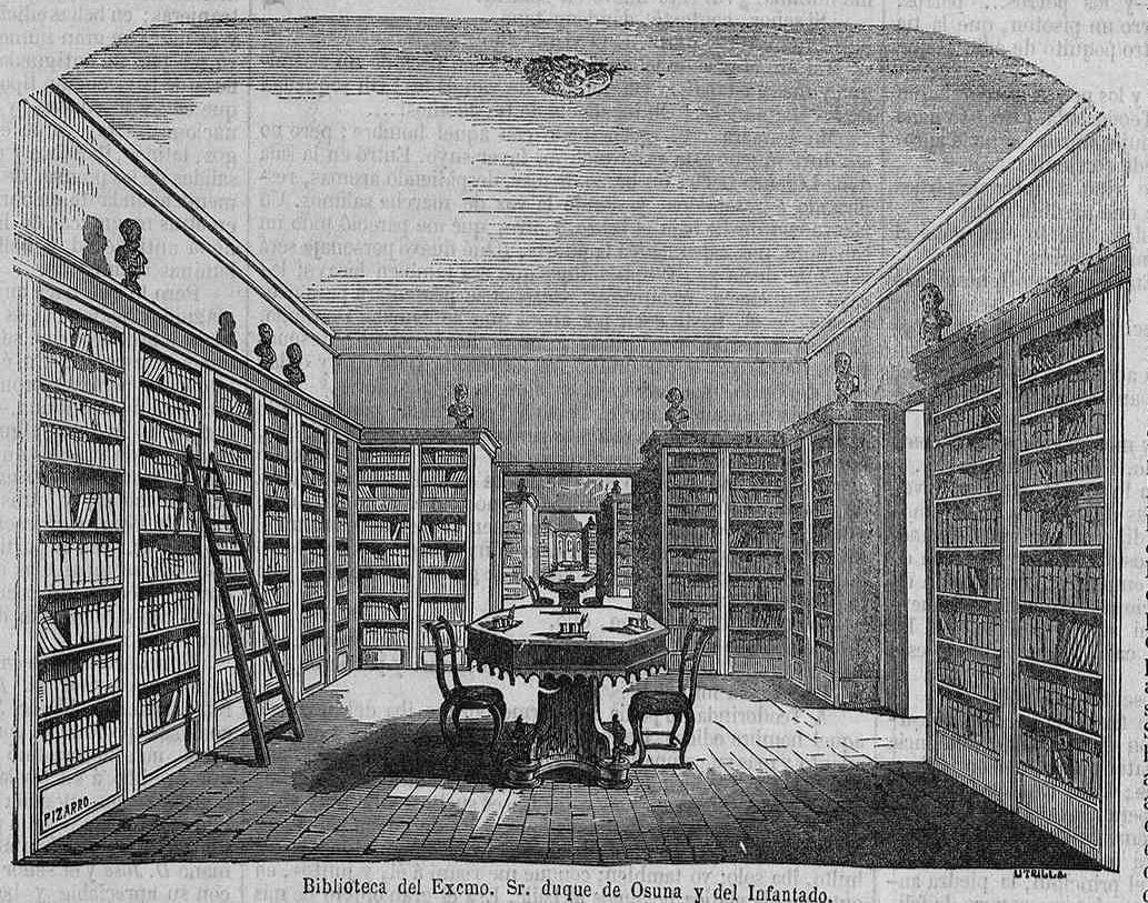 Biblioteca del duque de Osuna y del Infantado.